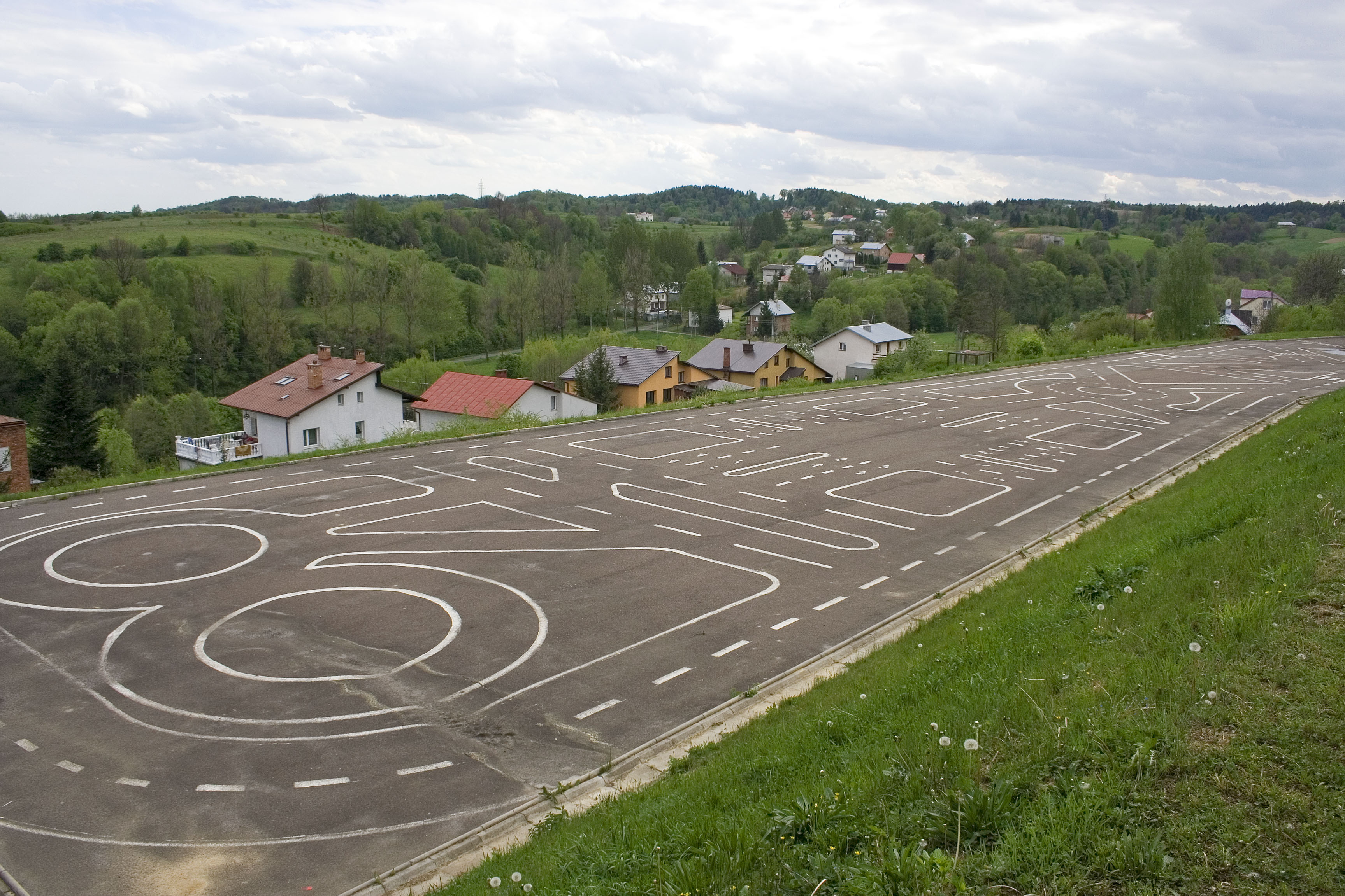 Miasteczko rowerowe przy Szkole Podstawowej nr 1 im. prof. Władysława Szafera w Brzozowie.